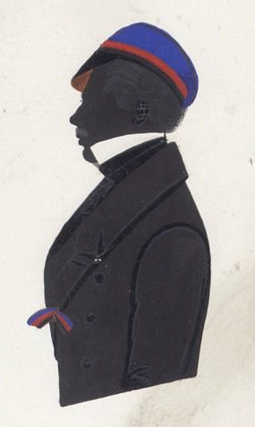 Silhouette des Studenten Thümmel aus dem Jahr 1817